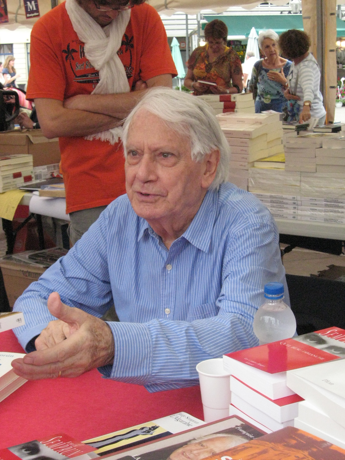 Jorge Semprun, à La Comédie du livre de Montpellier, 23 mai 2009